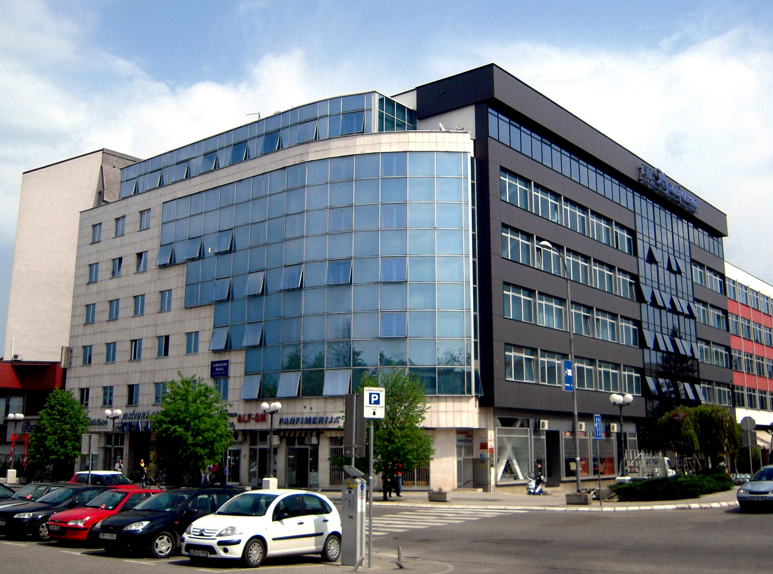 Зграда_ГП_Крајина